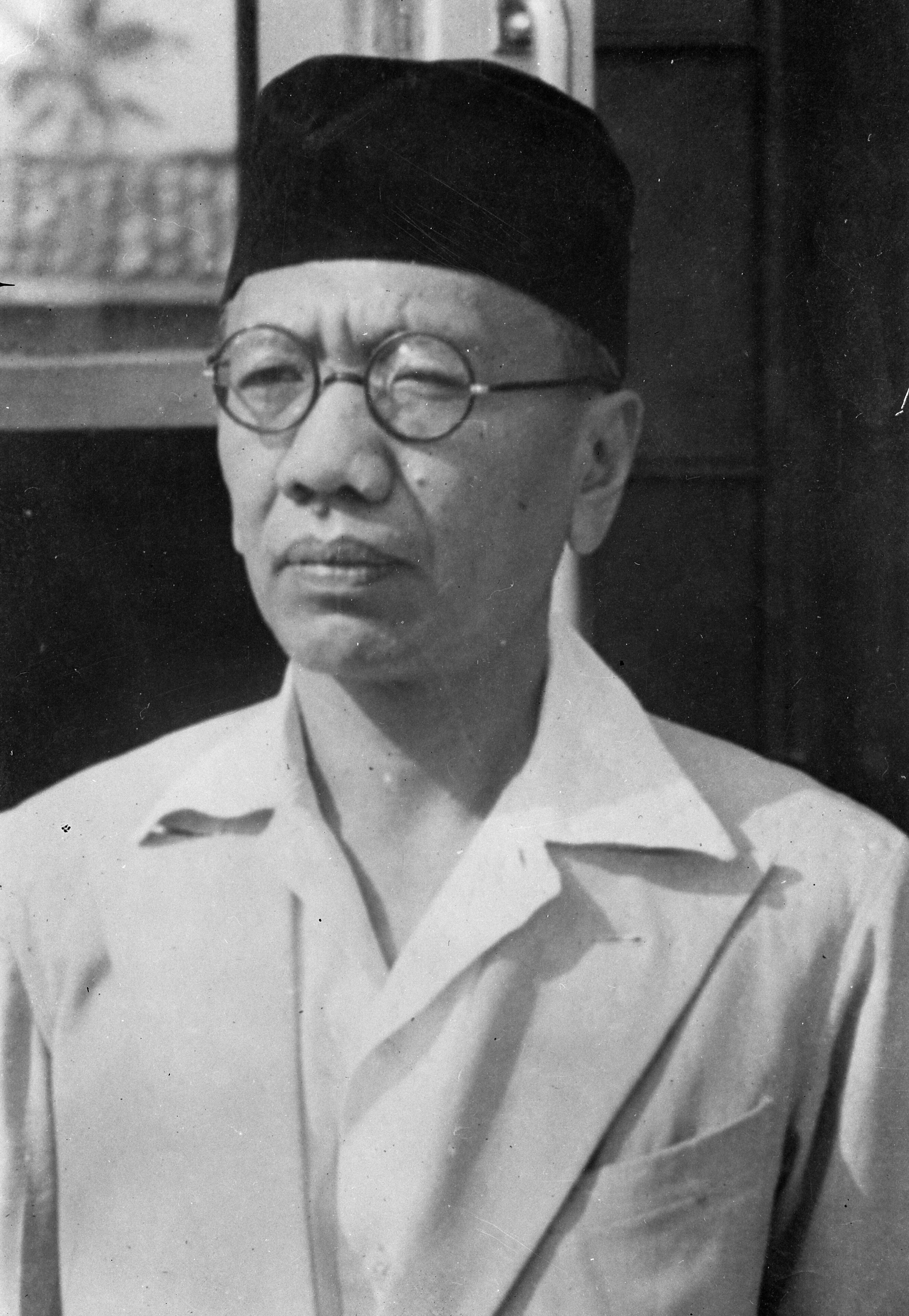 Collectie / Archief : Fotocollectie Dienst voor Legercontacten Indonesië Reportage / Serie : [DLC] Republikeinse autoriteiten Beschrijving : Soesanto Tirtoprodjo, minister van Justitie (Kehakiman) in het kabinet Sjahrir III Datum : 1947 Locatie : Indonesië, Nederlands-Indië Fotograaf : Fotograaf Onbekend / DLC Auteursrechthebbende : Nationaal Archief Materiaalsoort : Negatief (zwart/wit) Nummer archiefinventaris : bekijk toegang 2.24.04.03 Bestanddeelnummer : 11864